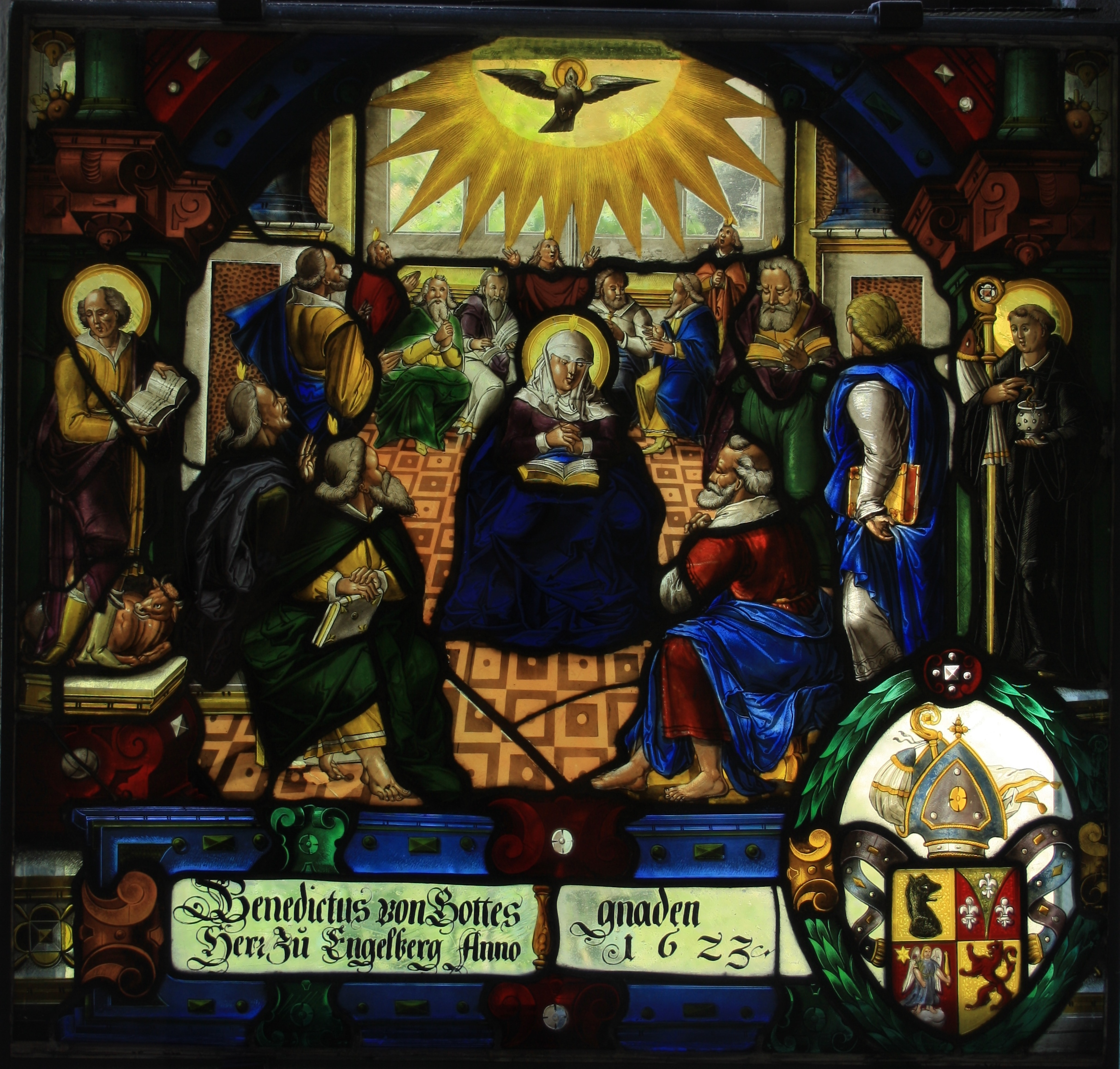 Wappenscheibe im Kreuzgang des Klosters Wettingen: Südarm, Sortierung von rechts nach links